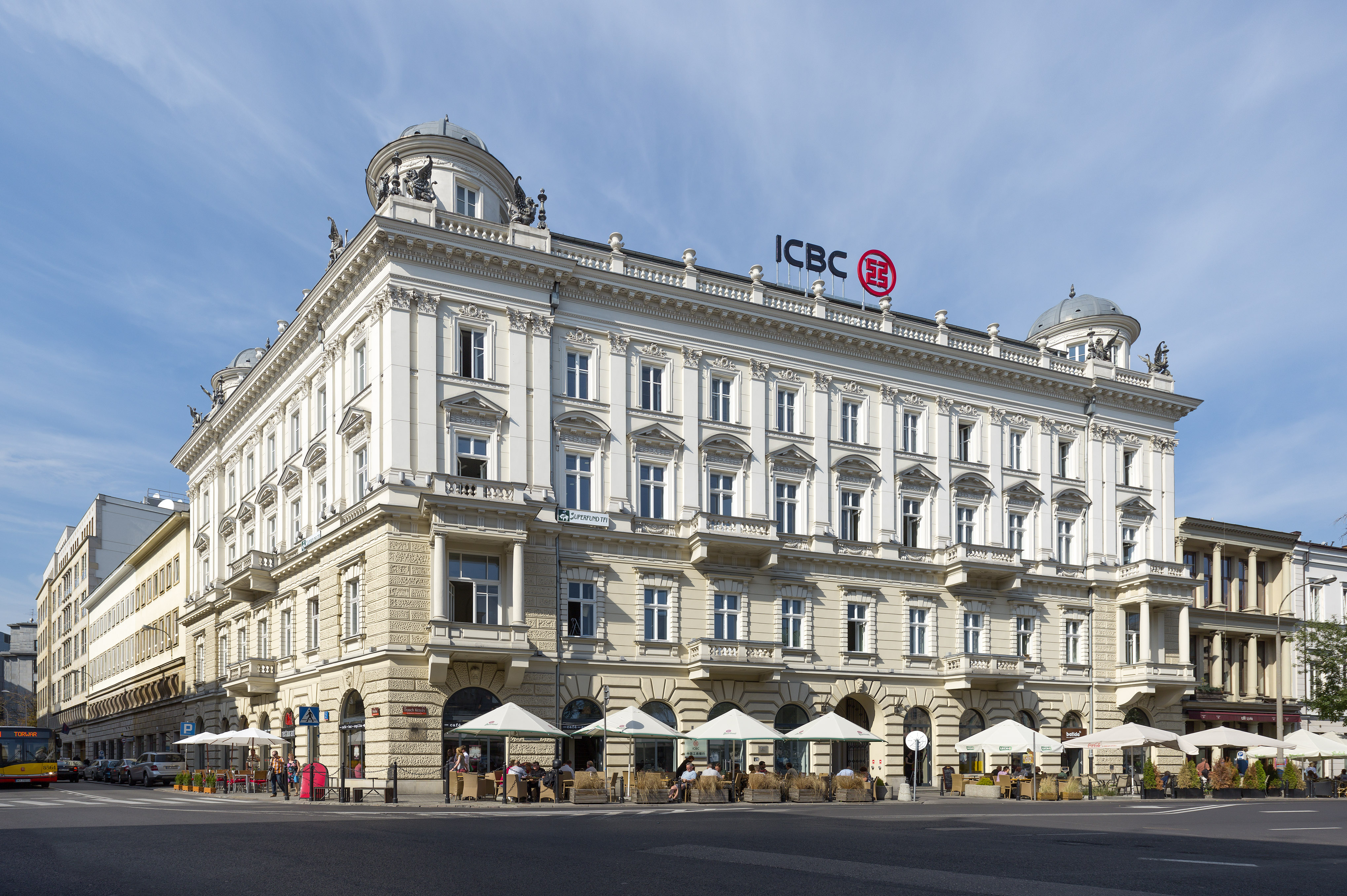 Budynek zlokalizowany przy placu Trzech Krzyży w Warszawie, zbudowany przez Józefa Hussa dla rodziny Fuchsów w 1886r.